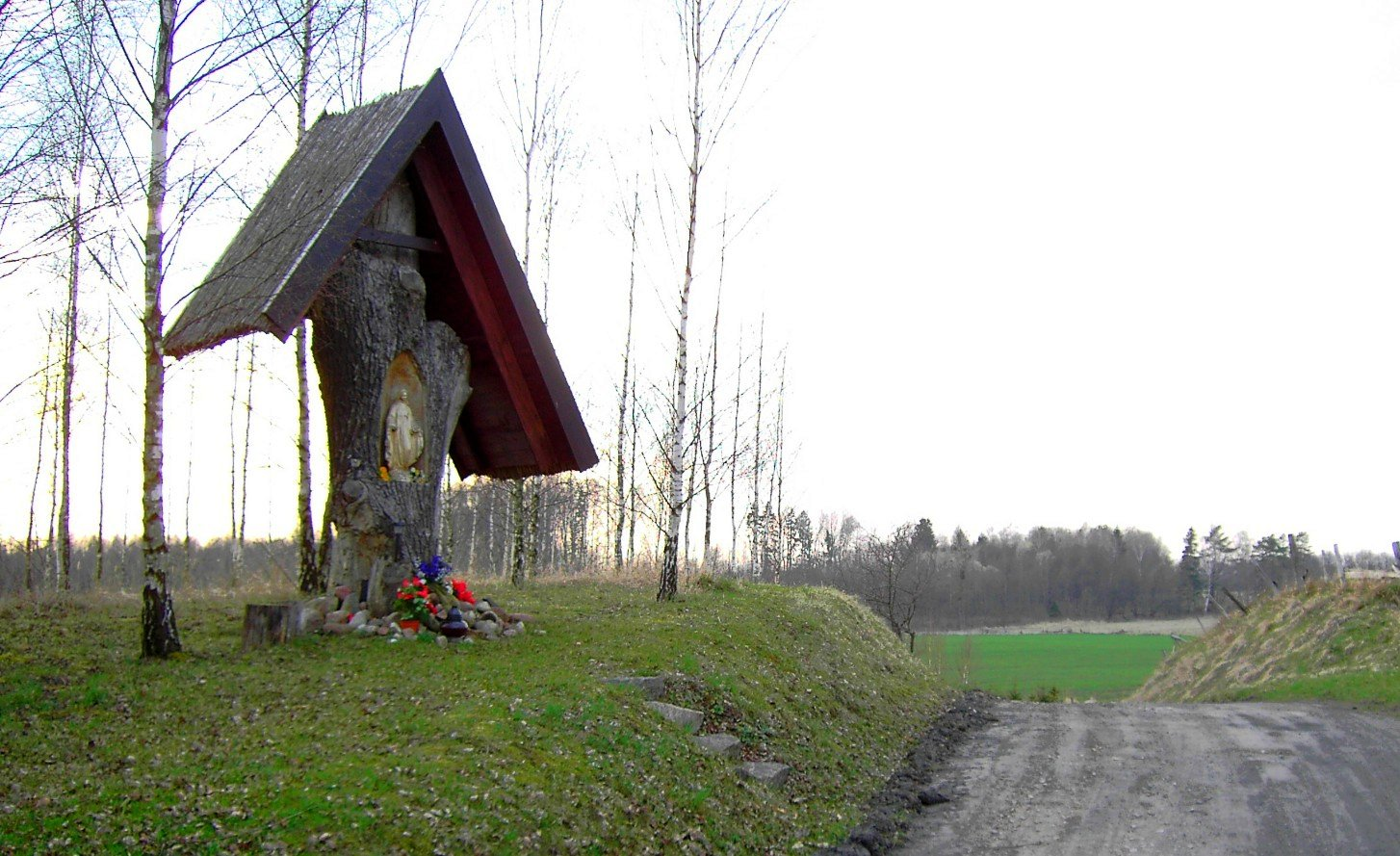 Kapliczka w Mazurkowie